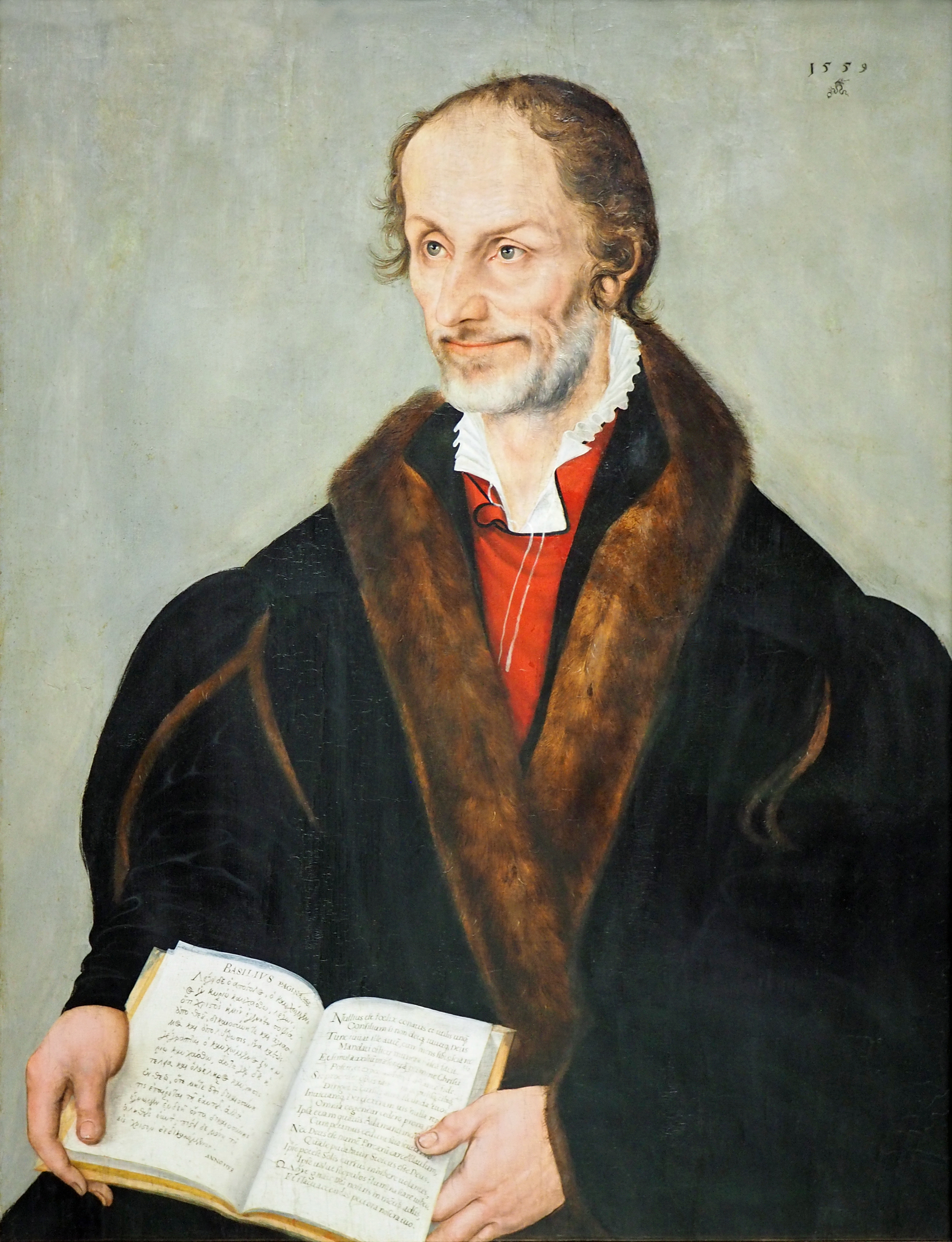 Nach einer Porträtvorlage von Lucas Cranach d. Ä.